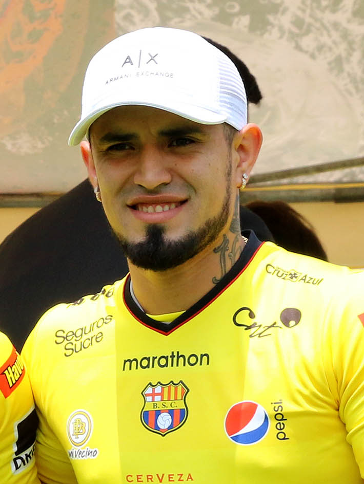 Guayaquil, martes 03 de enero del 2018 (Andes).-Barcelona de Ecuador presentó 4 nuevos refuerzos para la temporada 2018. Los ecuatorianos Steven Zamora, Jonathan Betancourt, Jean Carlos Montaño y el paraguayo Víctor Ayala fueron presentados esta tarde por la dirigencia torera. Foto:Andes/César Muñoz